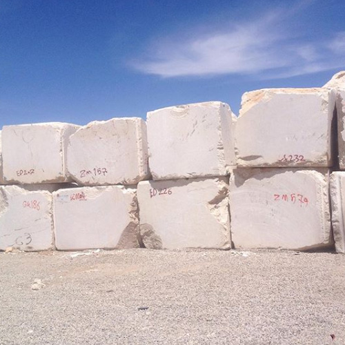 سنگ دهبید